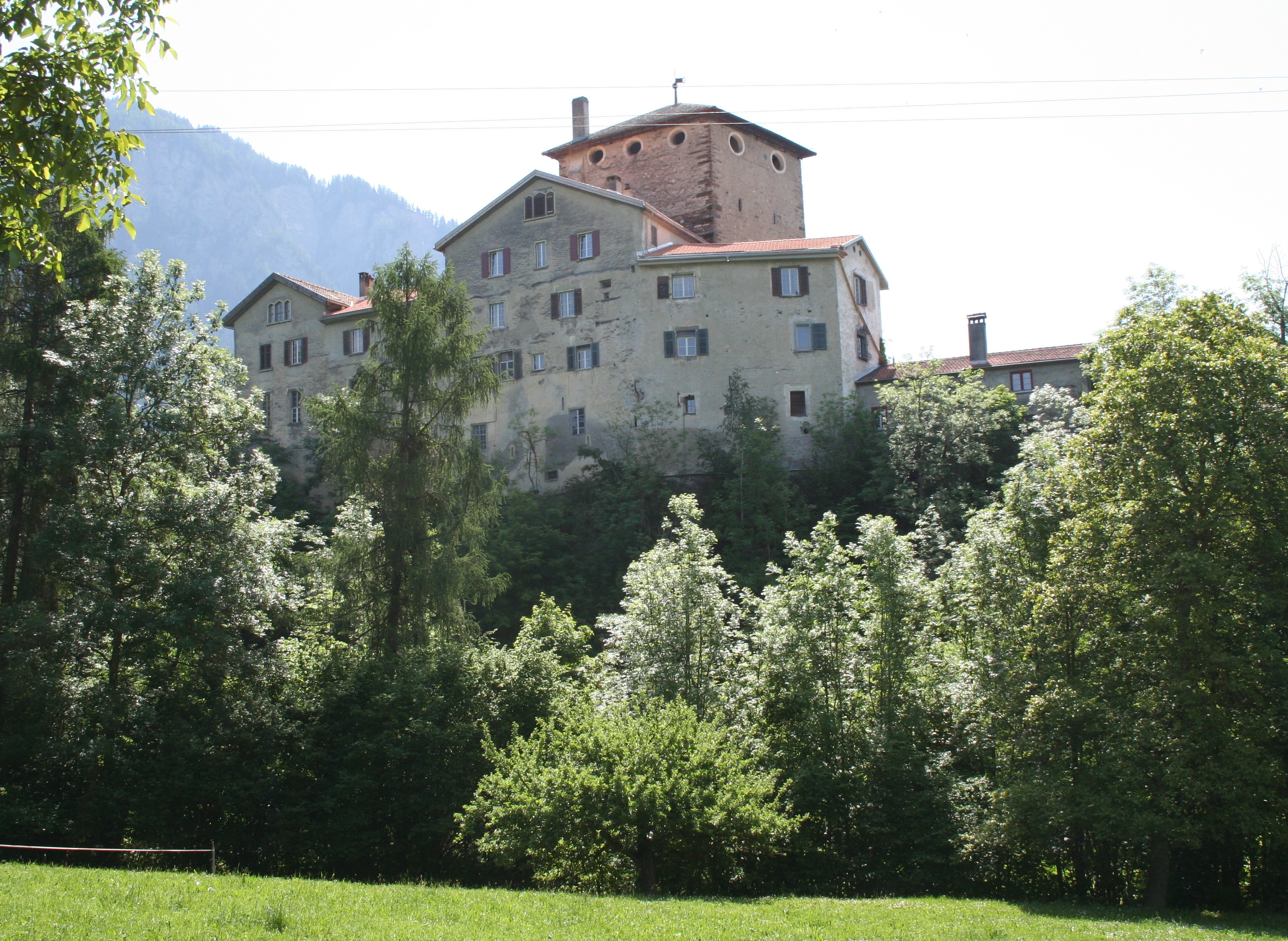 {Schloss Rietberg: Ansicht von Nordwesten